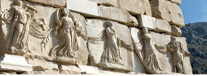 Frieze